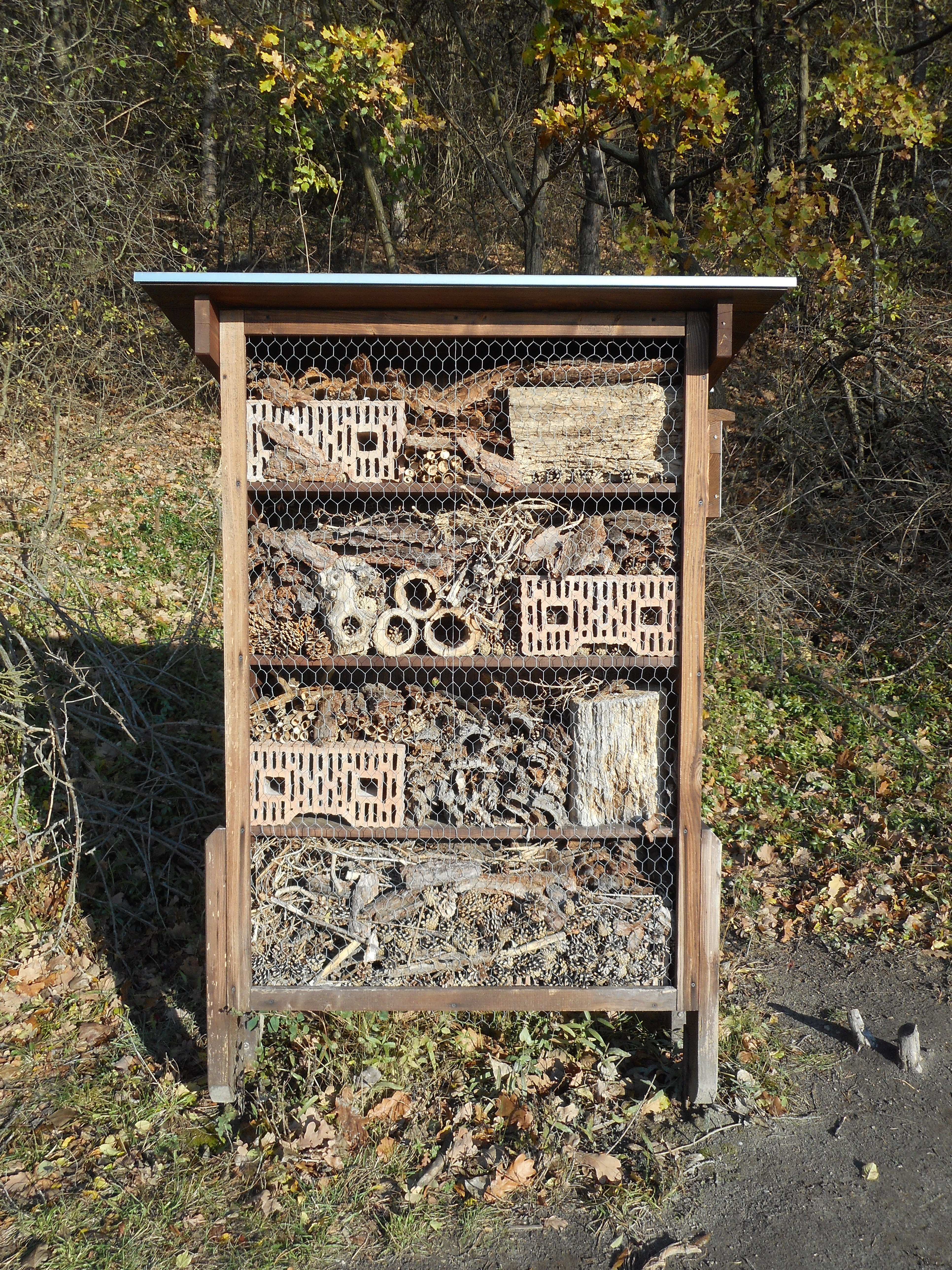 V hmyzom hoteli nájde svoje útočisko mnoho zástupcov hmyzu.